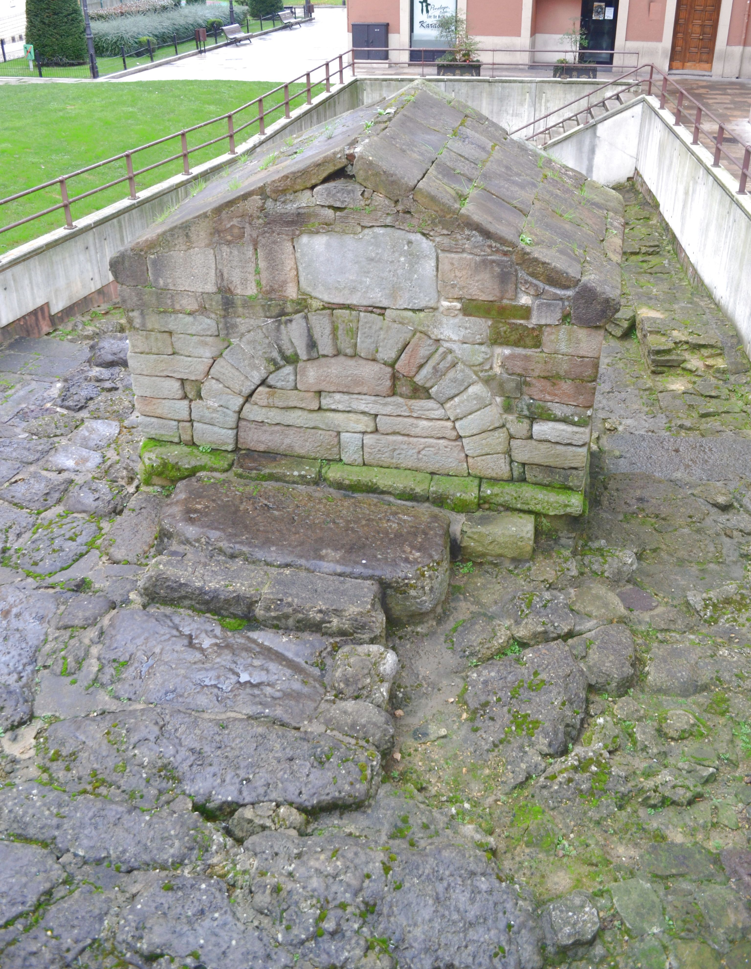 Trasera.